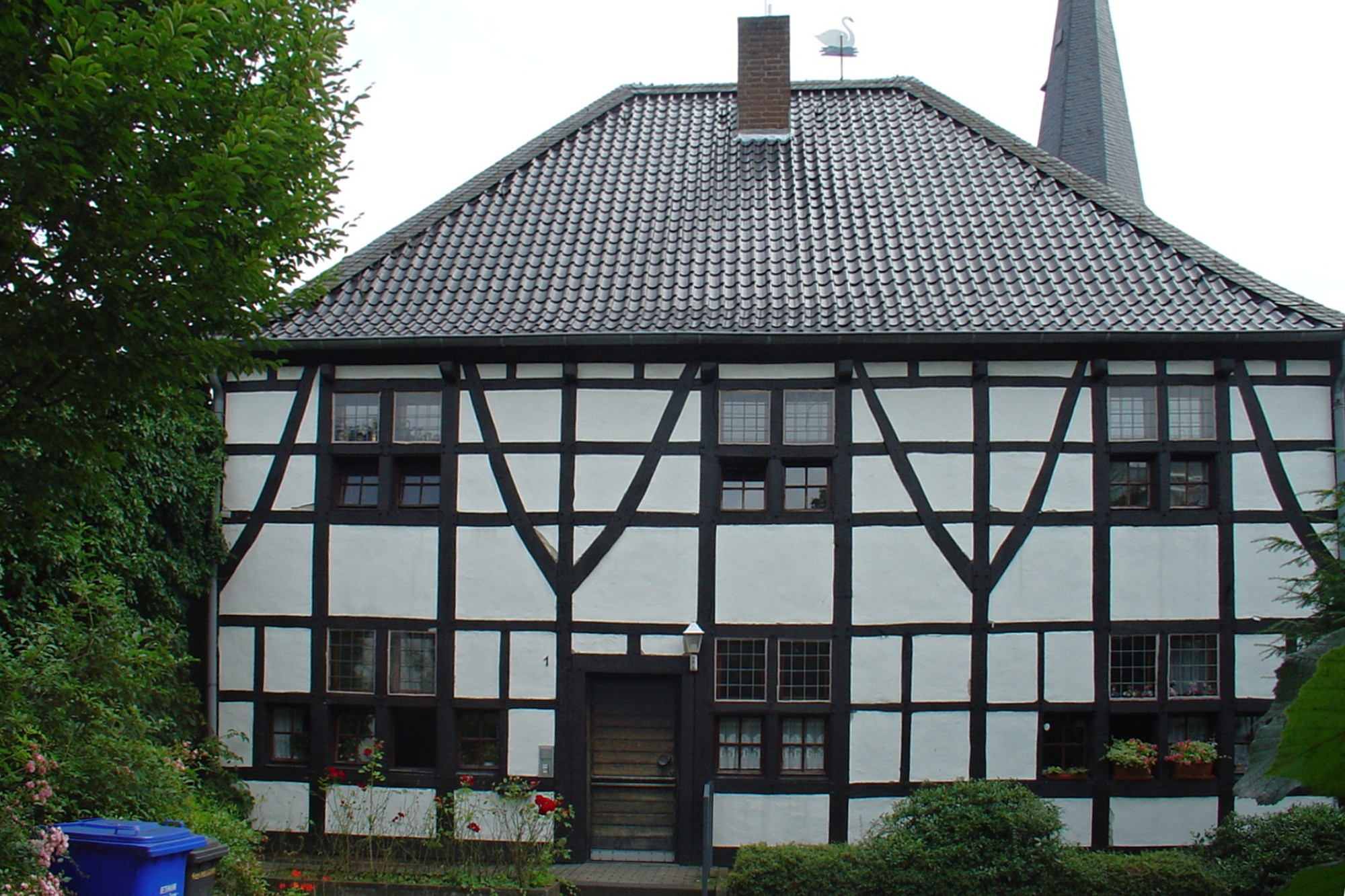 Haus zum Schwan, Fachwerkhaus, Hilden, Eisengasse 1, erbaut Anfang 18. Jahrhundert, transloziert von Gerresheimer Straße Ecke ApfelstraßeThis is a photograph of an architectural monument.